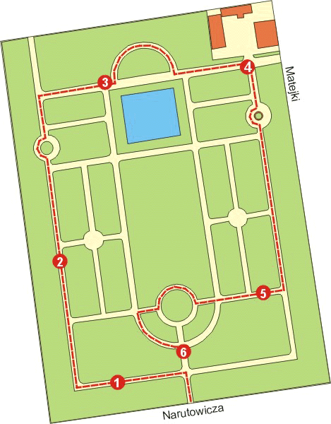 Mapa parku im. Matejki w Łodzi